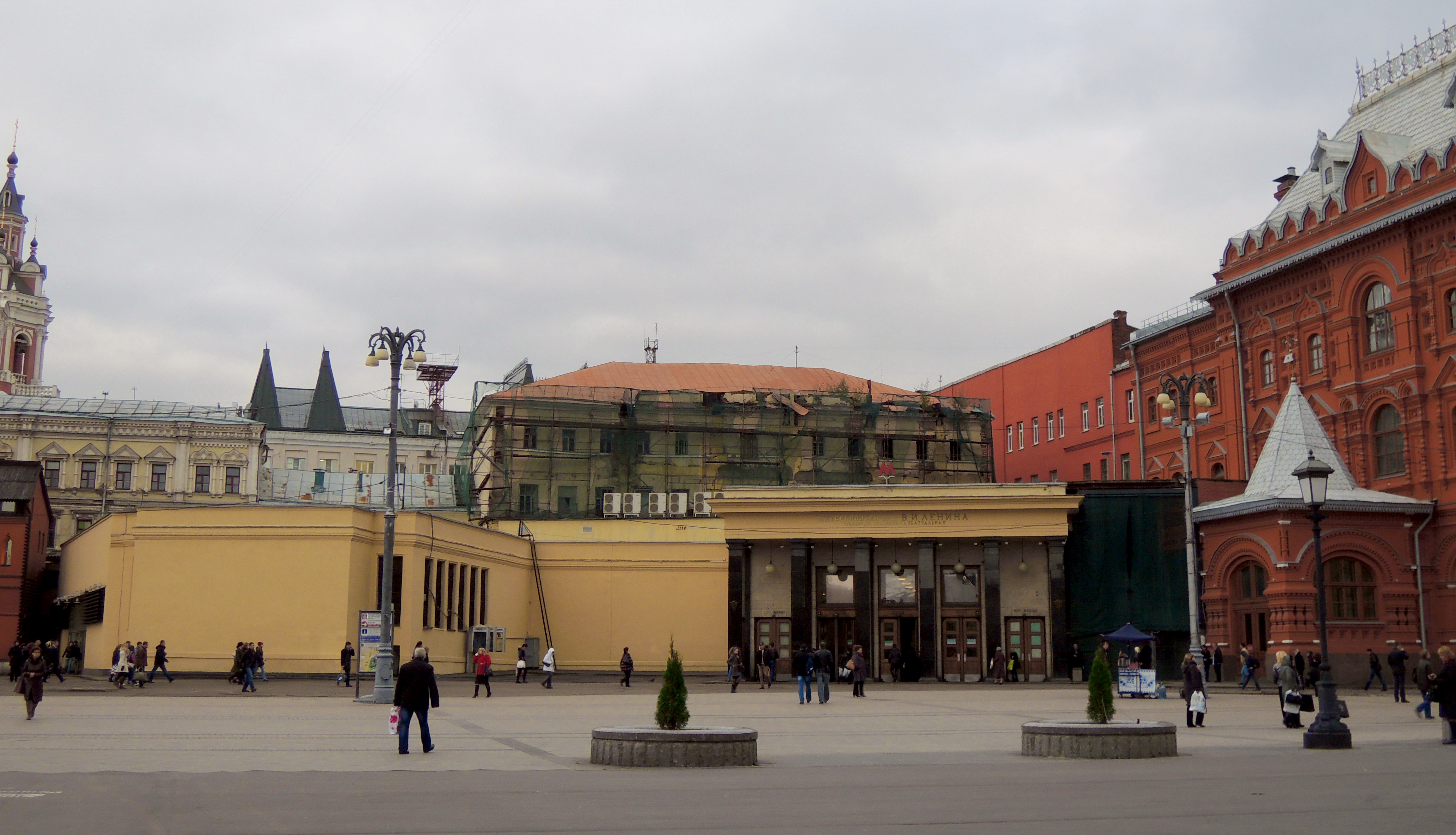 Площадь Революции (станция метро, Москва)